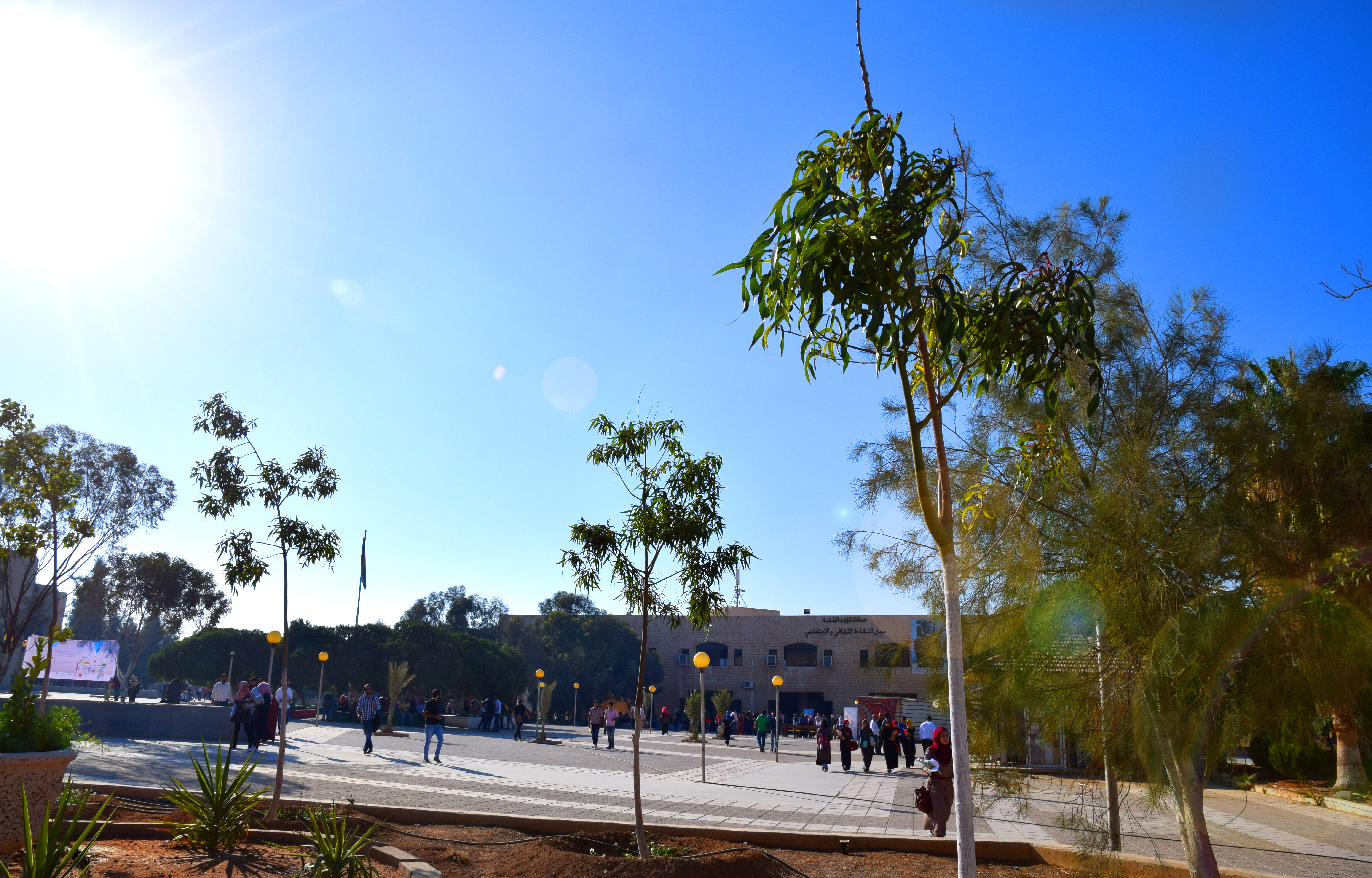 الهاشمية